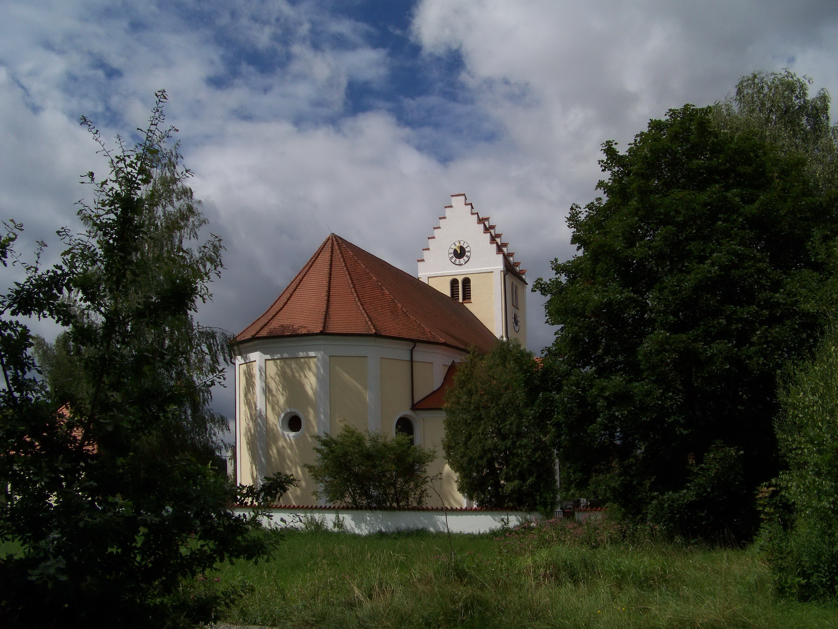 Neufahrn in Niederbayern. Hebramsdorf 5. Filialkirche St. Johannes der Täufer. Erbaut 1730, über älterem Kern; mit Ausstattung. Ansicht von Osten.